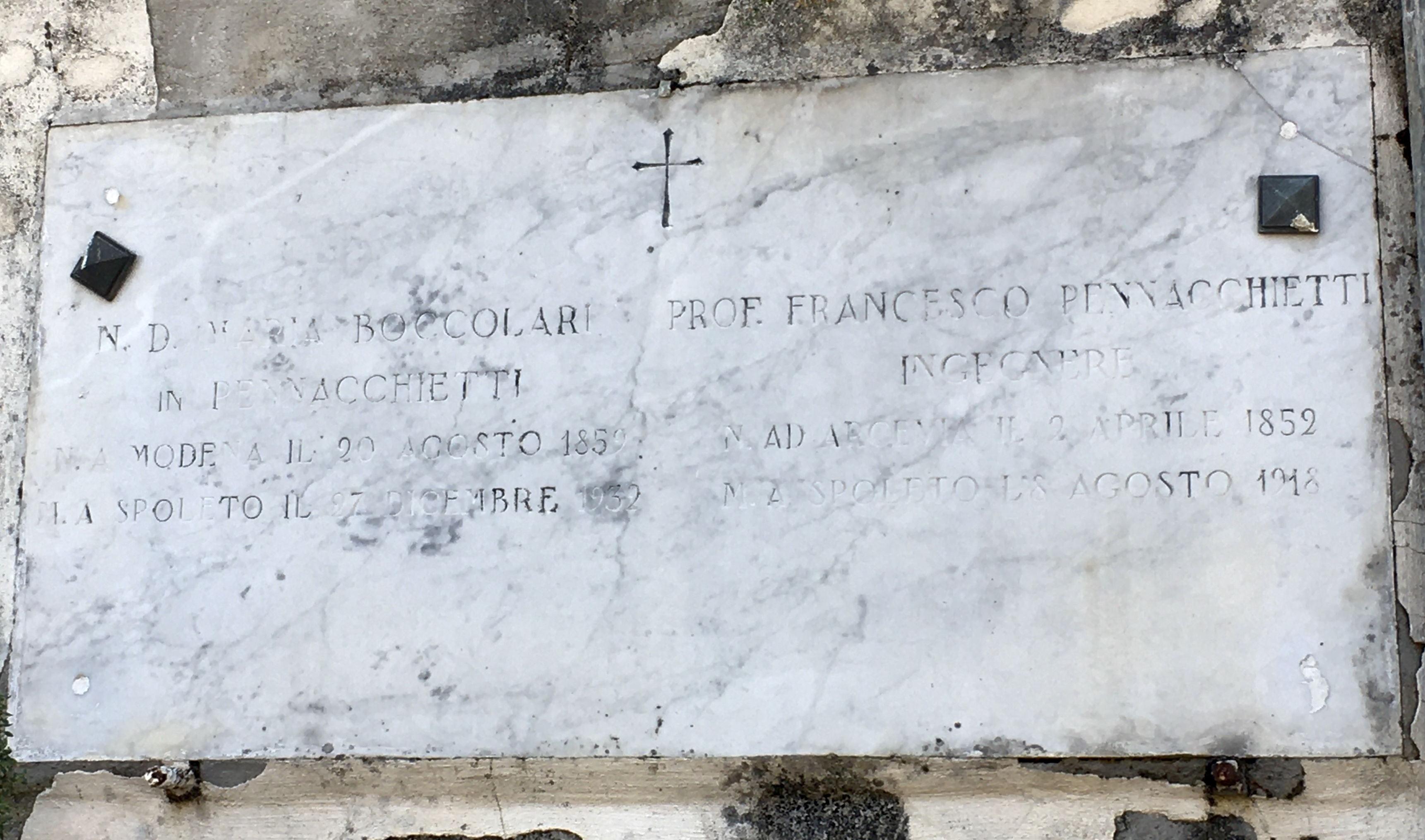 Cimitero monumentale di Spoleto. Tomba di Francesco Pennacchietti e della moglie.